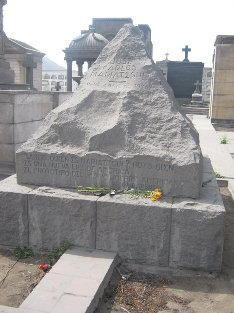 Jose Carlos Mariategui (Tumba)